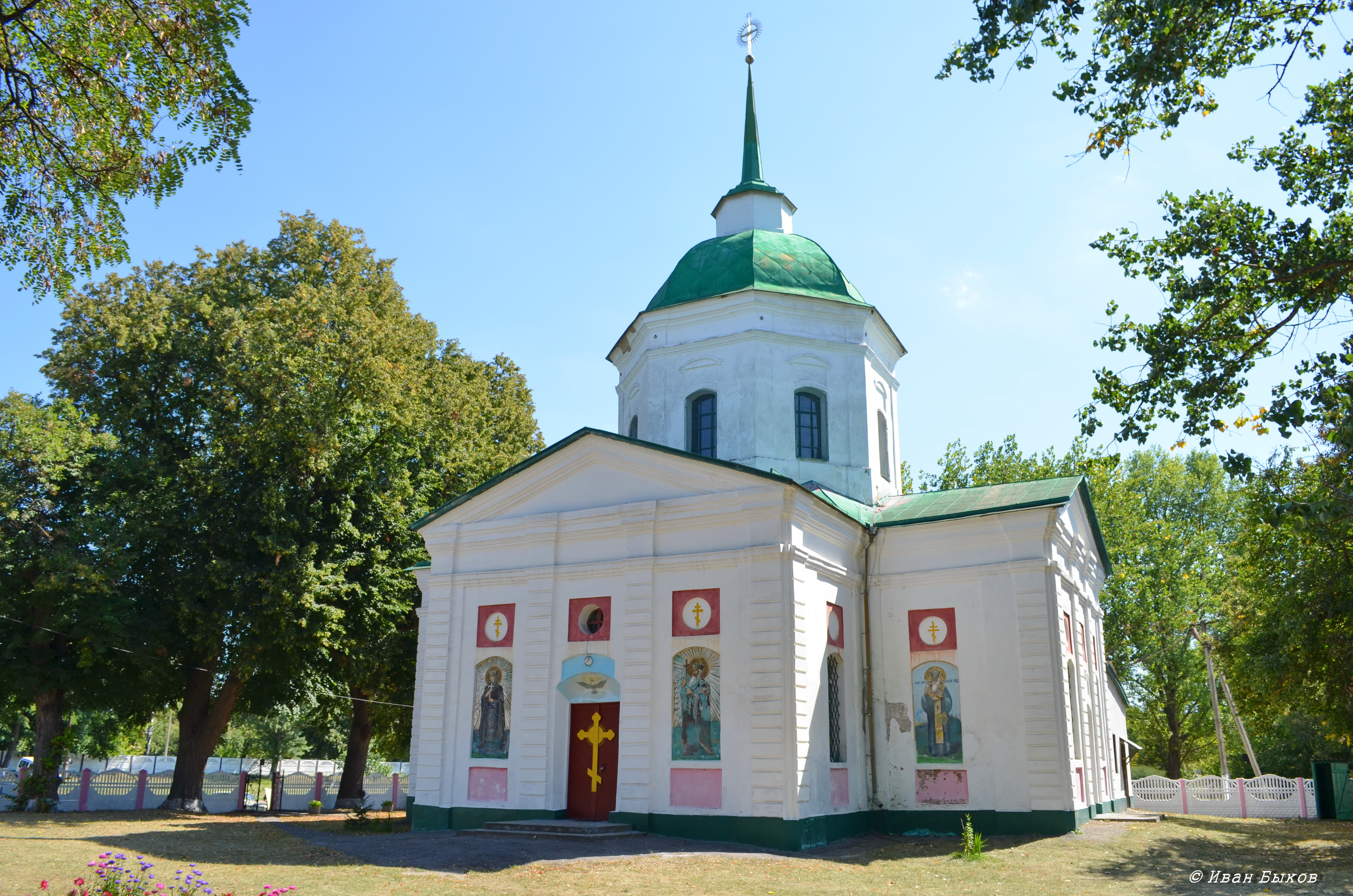 Вишняки. Троїцька церква. 1794-99 рр.